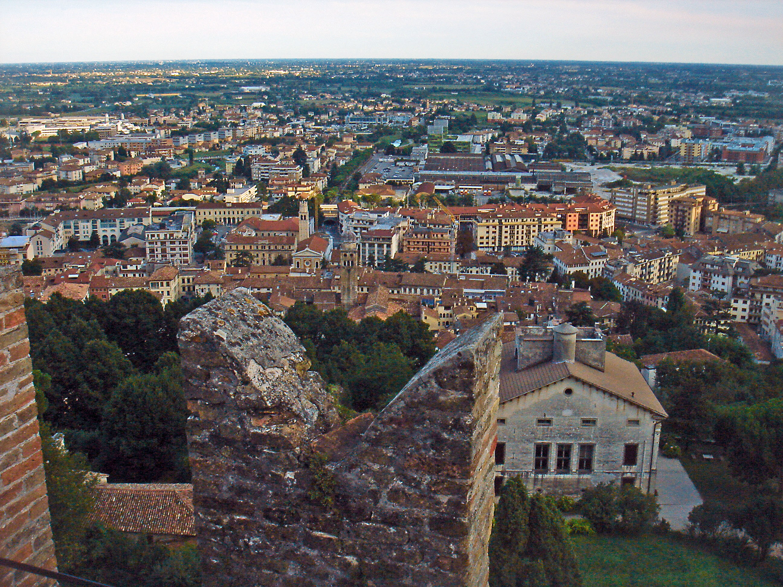 La città di Conegliano vista dal Castello